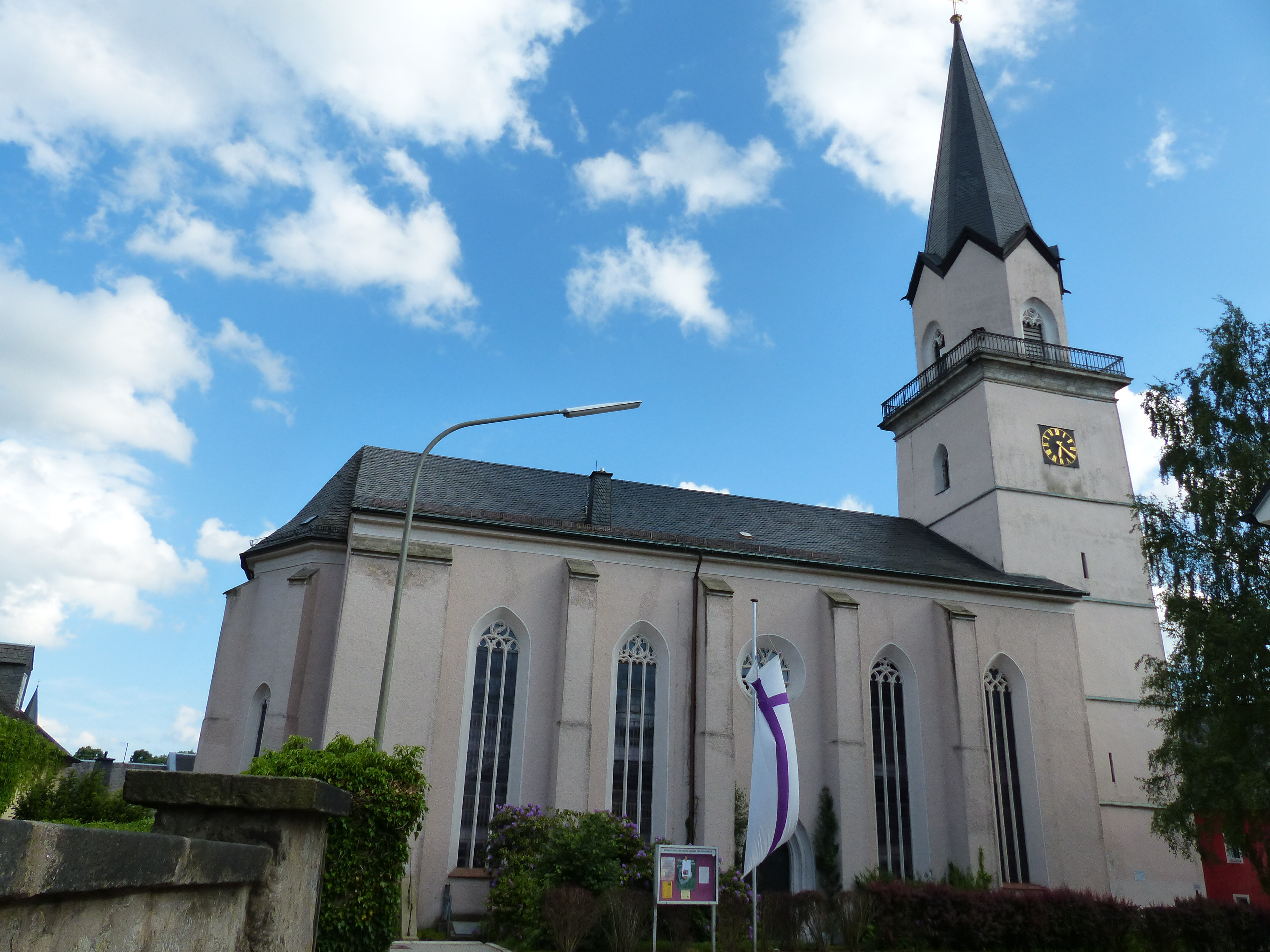 Ortsansichten von Kirchenlamitz